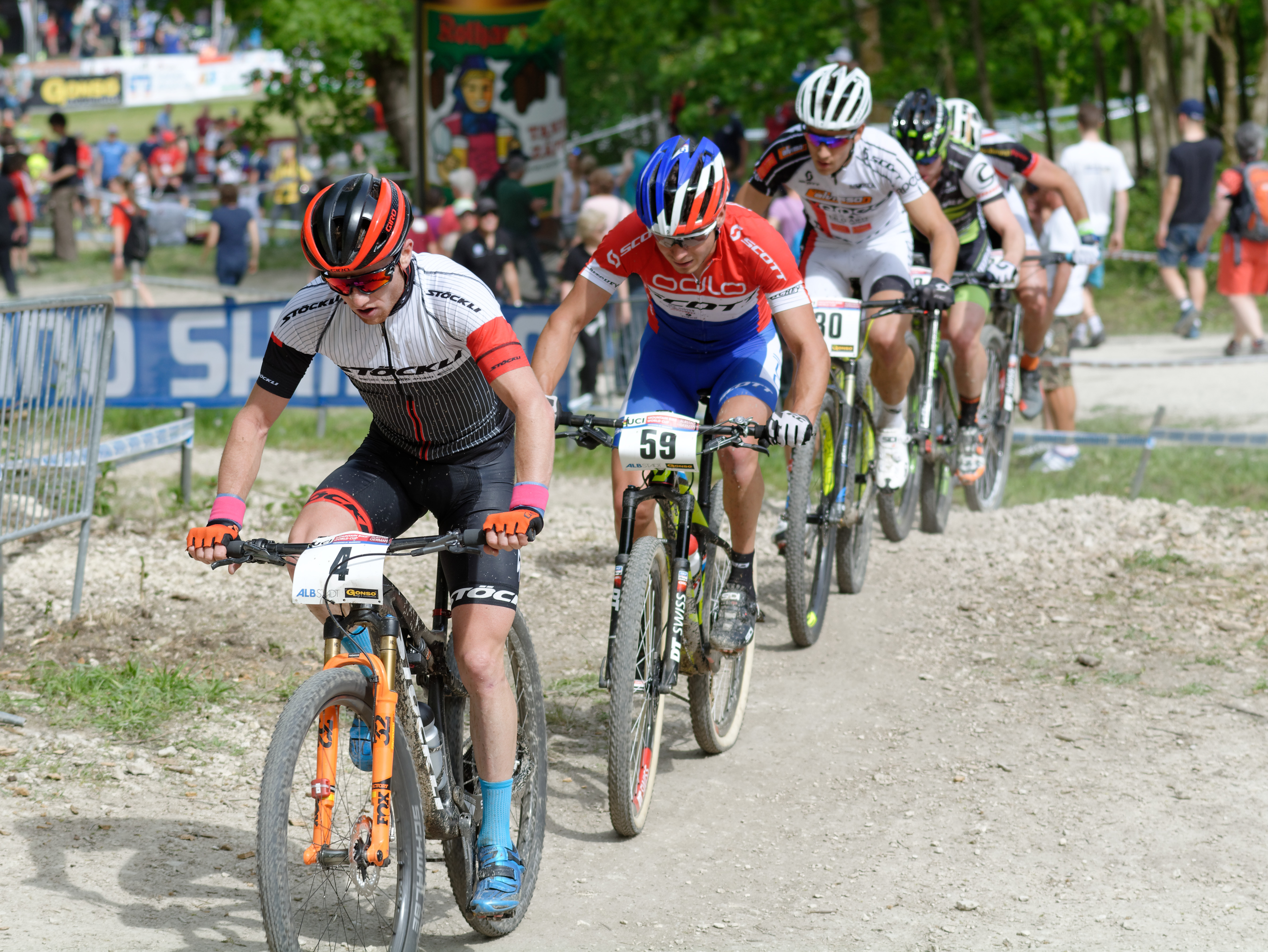 D71_7598_DxO